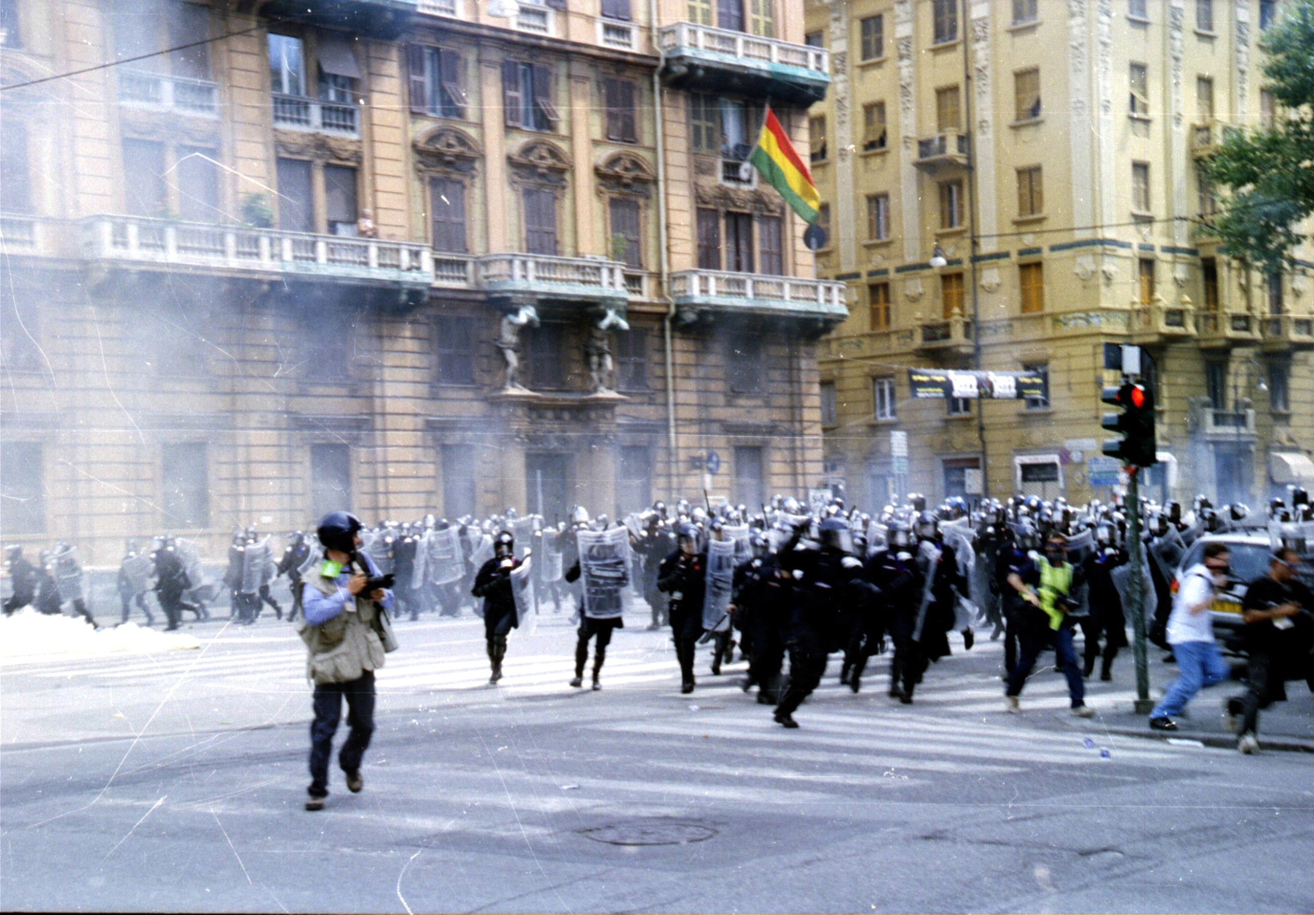 Genova - Fatti del G8 del 20 luglio 2001 Carica della polizia a Corso Torino